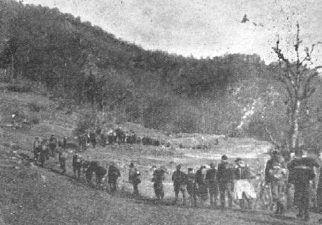 Šlandrova brigada na pohodu čez Menino planino.